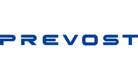 Logo